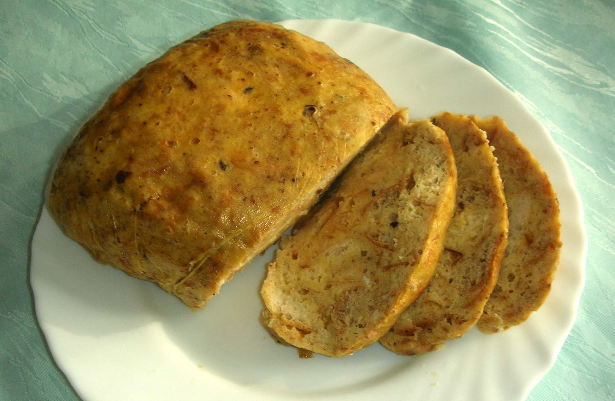 Serviettenkloß, nach Thüringer Familienrezept selbst hergestellt Hauptzutaten: Wasser, Milch, Semmeln, Eier, Muskatnuss, Salz, In Serviette ca. 40 Minuten gekocht